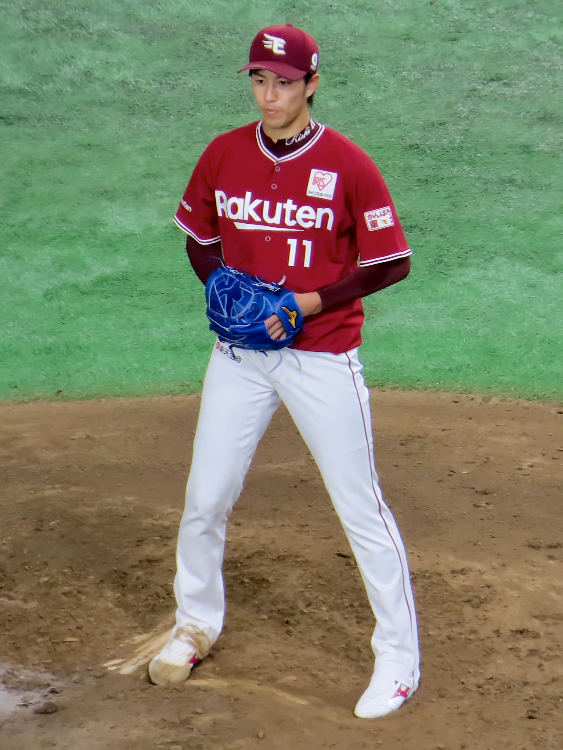 東北楽天ゴールデンイーグルスの選手。東京ドームにて。